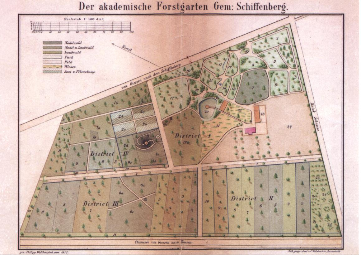 Plan des Akademischen Forstgartens Gießen von 1877. Die mit "Chaussee von Giessen nach Hausen" bezeichnete Straße an der Kartenbasis ist heute der Schiffenberger Weg (L 3131). An dem Abzweig von der Straße in der Park (in der Zeichnung nach oben) befindet sich heute eine Bushaltestelle 50°33′28″N 8°42′48″E / 50.55769°N 8.713255°E (Name: Gießen Forstgarten)